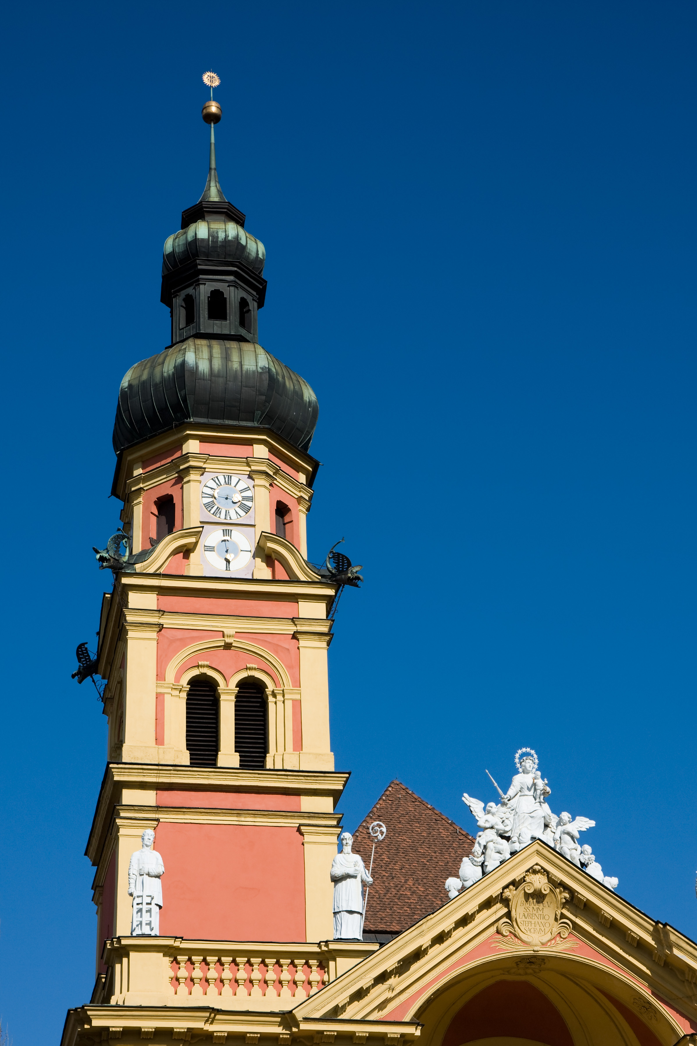 Turm der Stiftskirche Wilten in Innsbruck